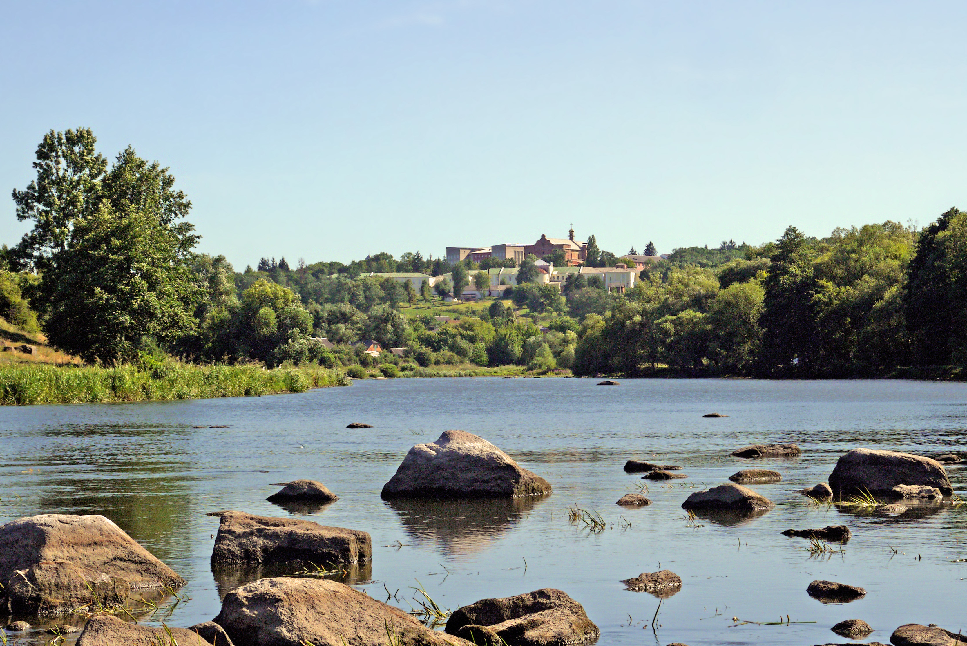 Садиба Ярошинських, Тиврів, вул. Леніна, 14